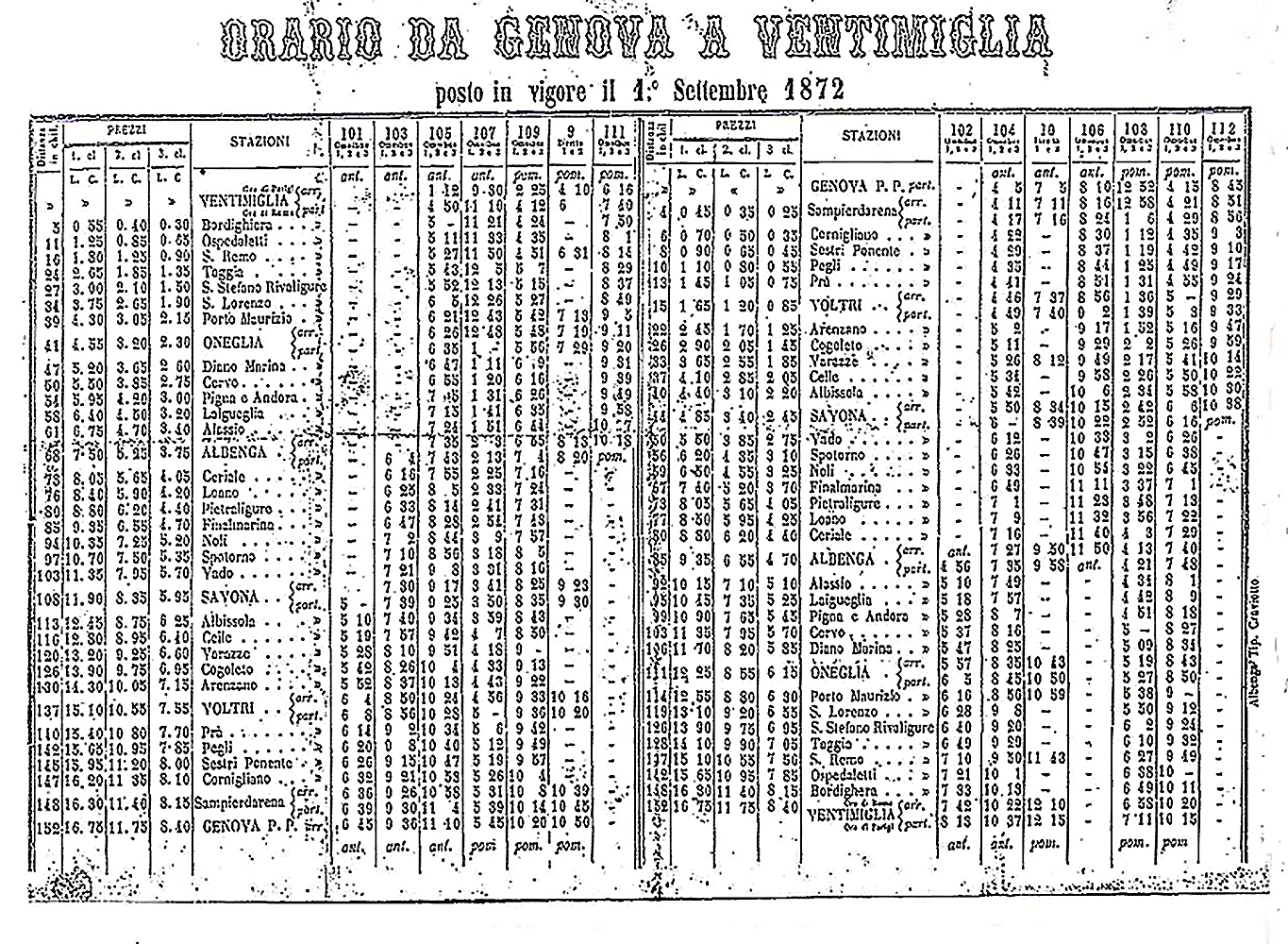 Orario in vigore sulla ferrovia Genova - Ventimiglia a partire dal 1° Settembre. 1872